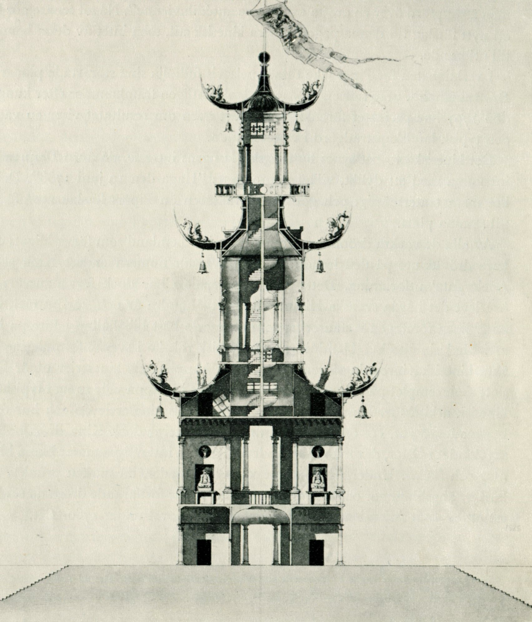 Förslag till kinesisk pagod i Drottningholms slottspark